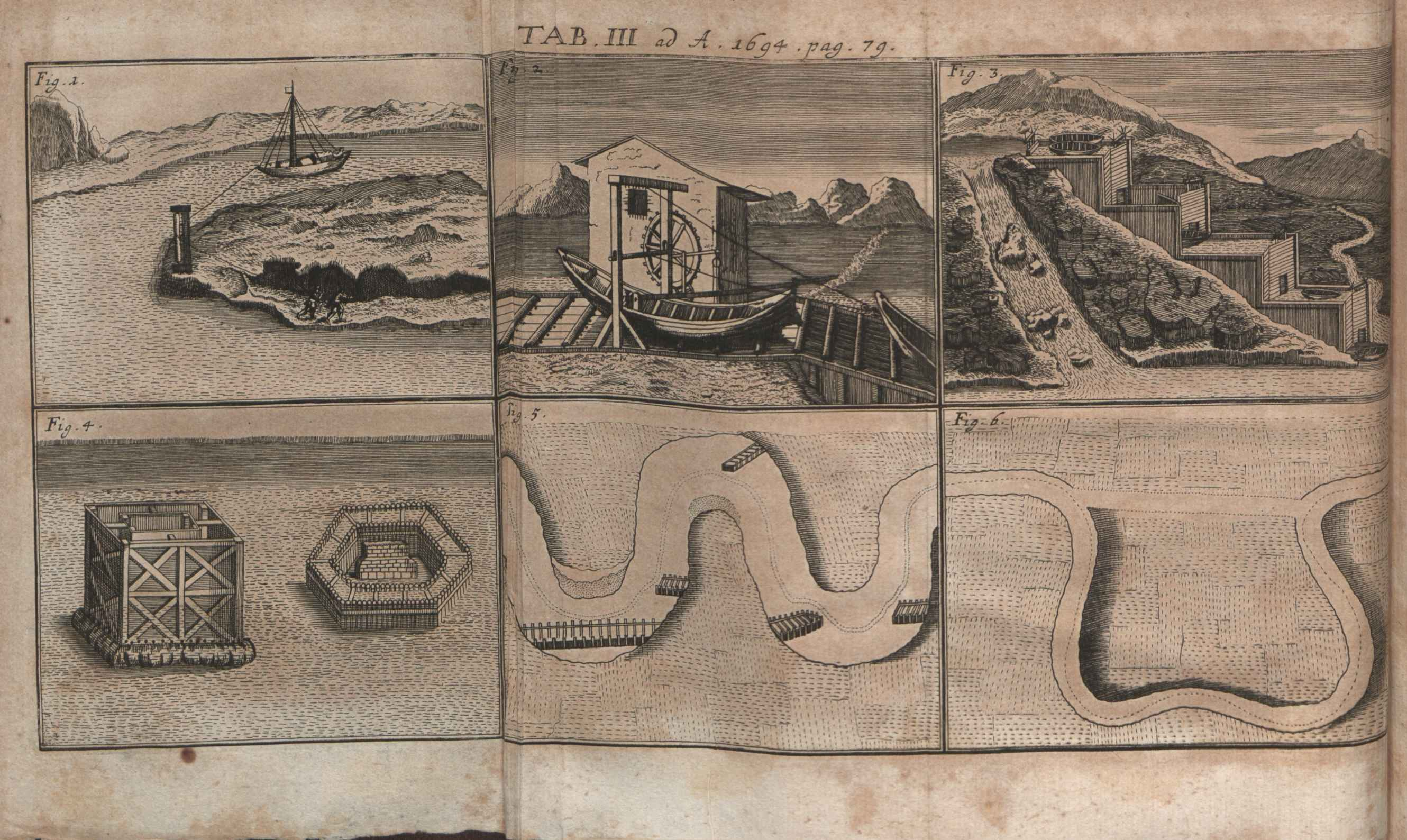 Illustration